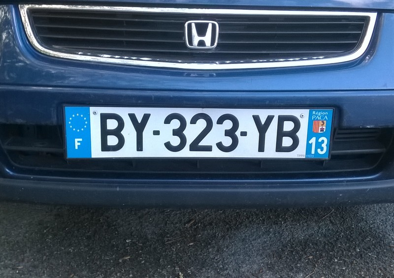 Immatriculation palyndromique : peut se lire indifféremment de gauche à droite ou de droite à gauche.